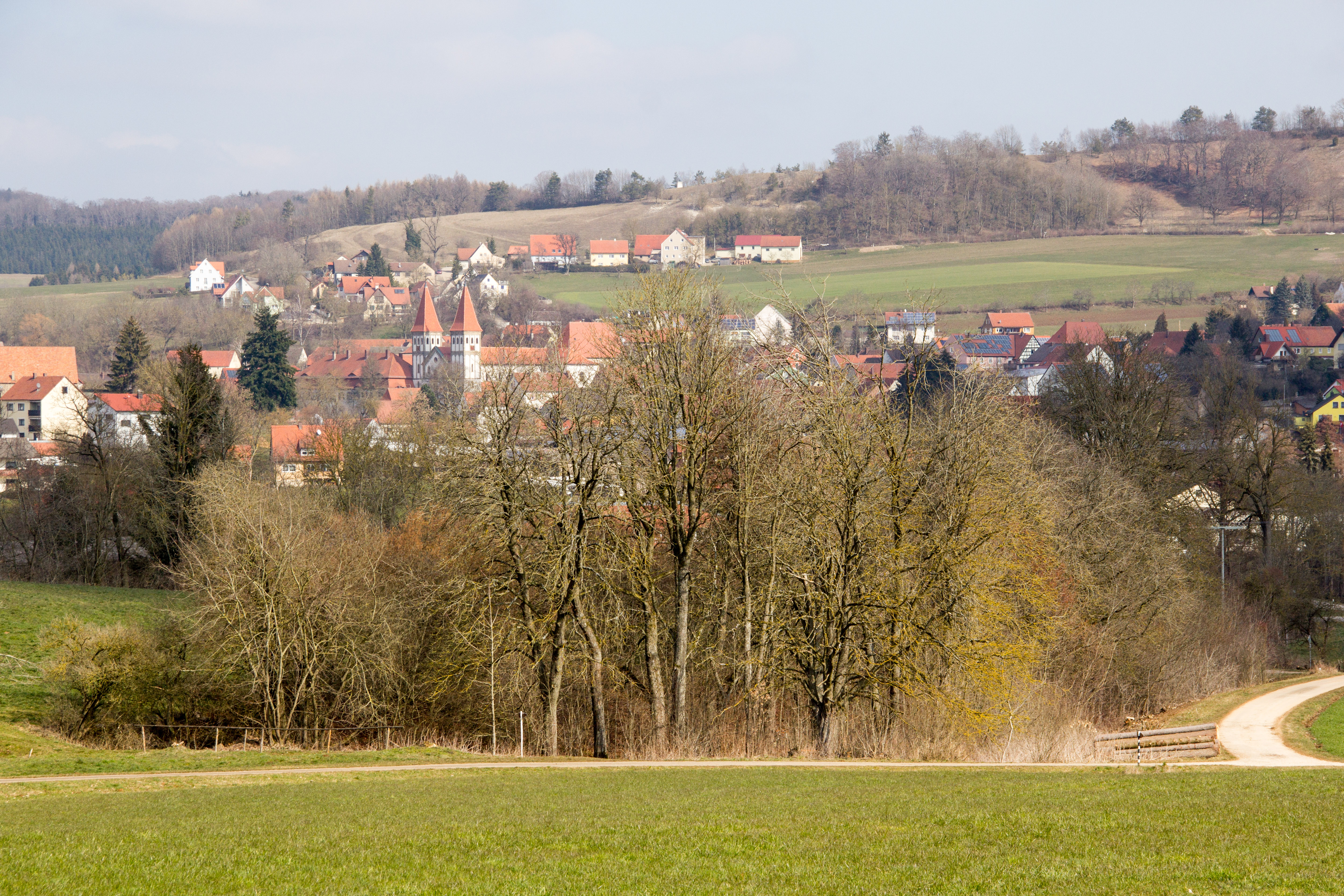 Heidenheim, Hahnenkamm, Ortsansicht